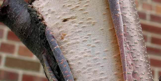 River Birch.